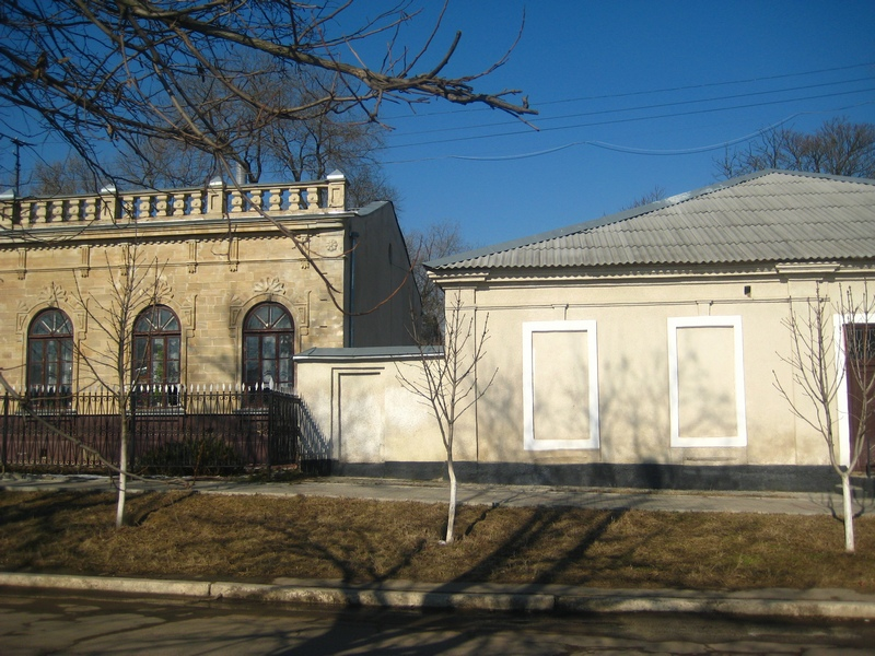 Бывшая синагога врачей